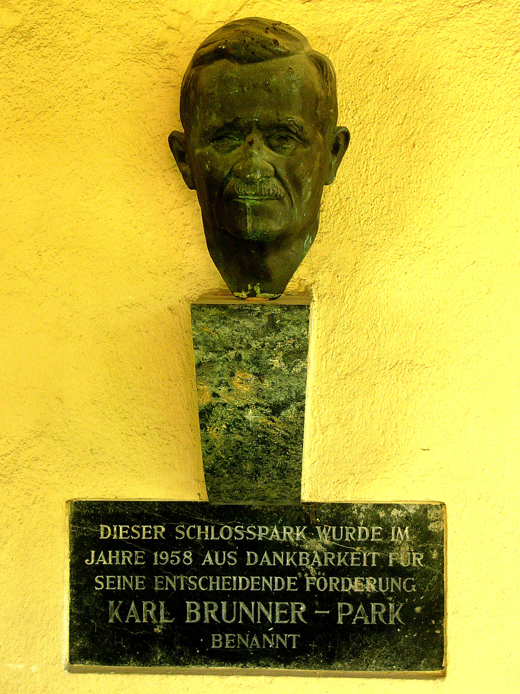 Büste von Karl Brünner am Parkeingang in Pöllau.